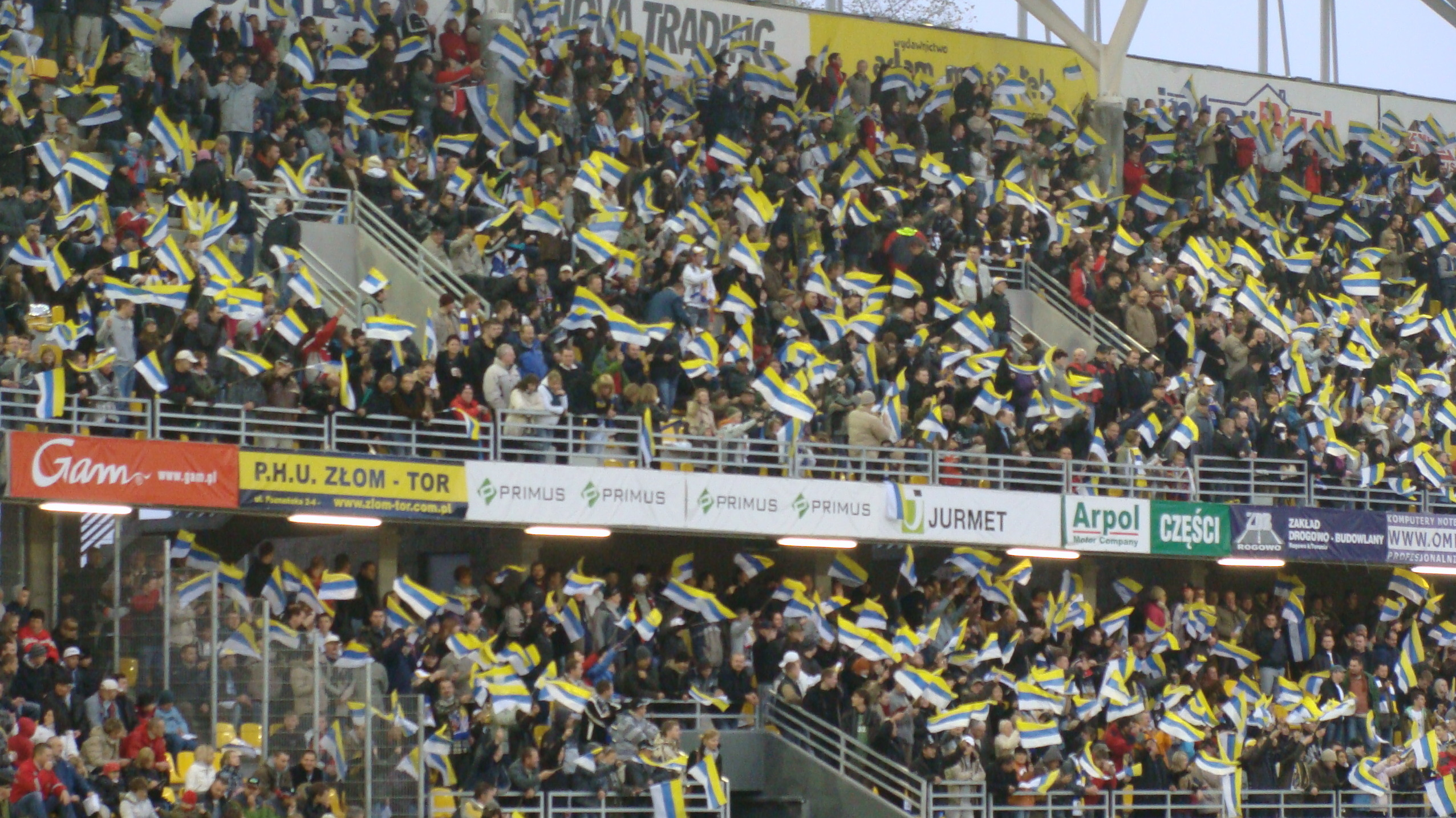 Kibice Unibaksu Toruń podczas finałowego spotkania DMP 2009 przeciw Falubazowi Zielona Góra